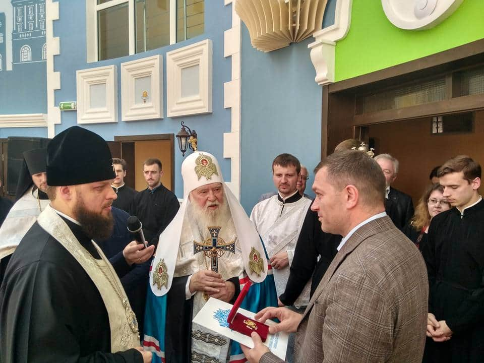 Патріарх Київський і всієї Руси - України Філарет та Микола Поворозник в Київському міському центрі реабілітації дітей з інвалідністю